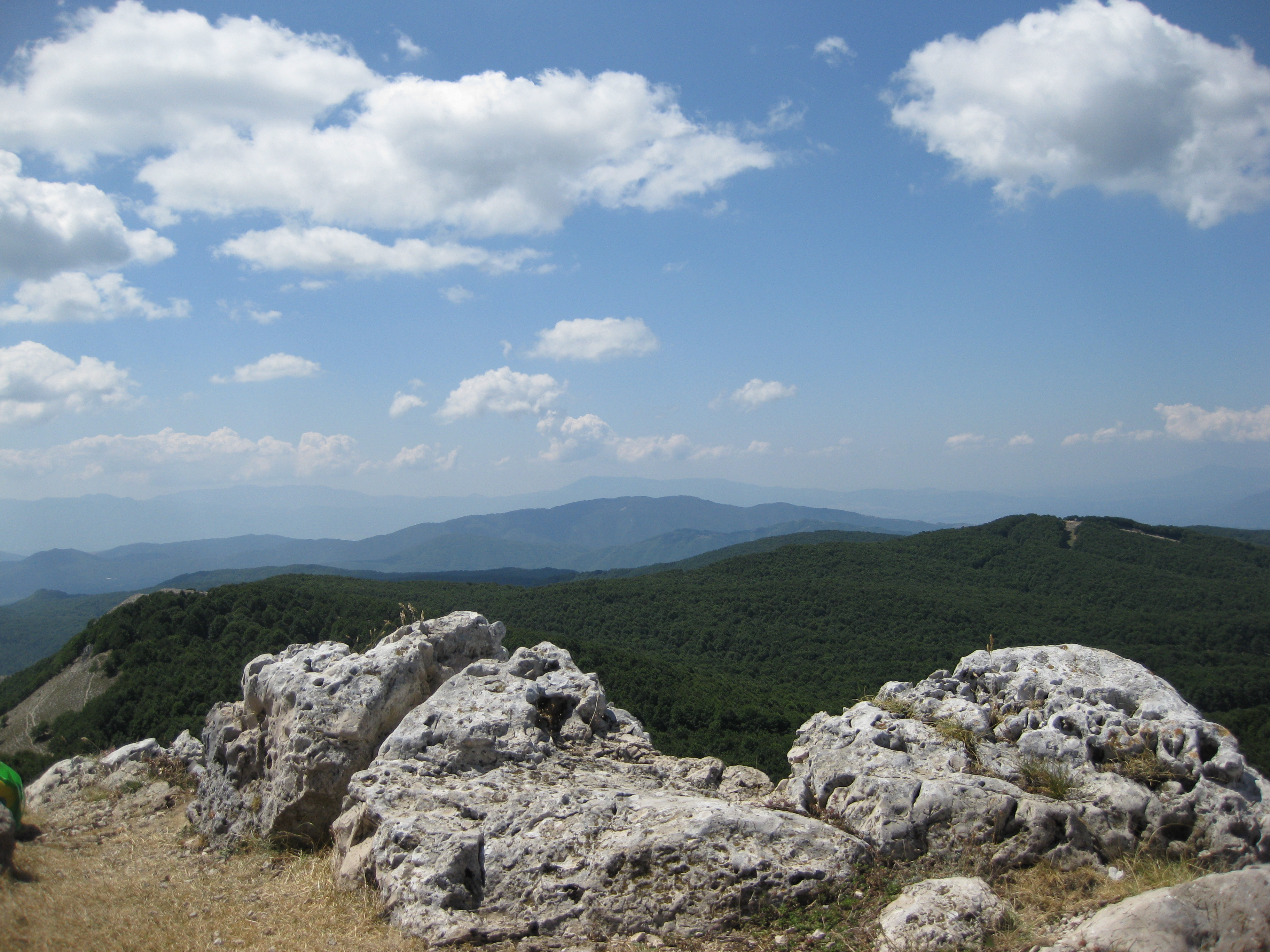 Monte Autore (Monti Simbruini), 1853 m. s.l.m.